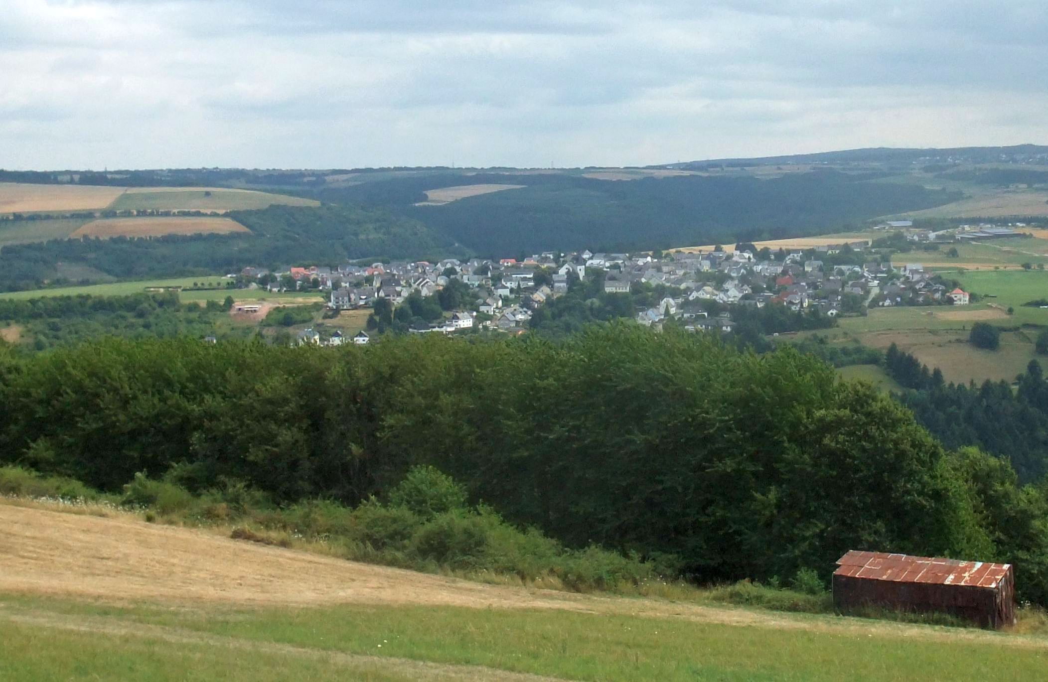 Morscheid